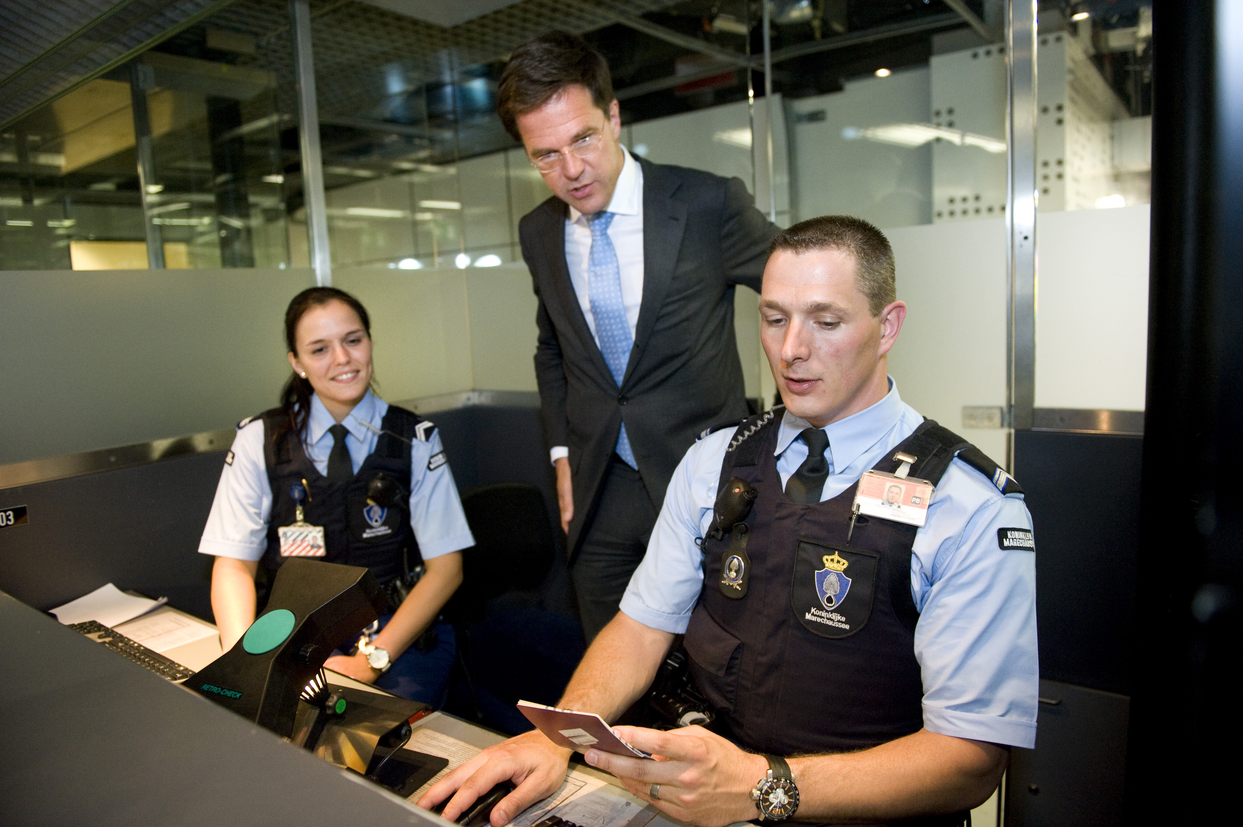 De minister-president heeft vanmiddag een werkbezoek gebracht aan de Koninklijke Marechaussee op Schiphol. De Marechaussee verricht met 1800 leden op de luchthaven taken op het gebied van recherche, politiediensten en grensbewaking. Na een uitleg in de bagagekelder over de diverse werkzaamheden van de recherche kreeg de minister-president uitleg over de politietaken van de Marechaussee, onder meer ondersteund door een demonstratie van de explosievenspeurhonden van de Marechaussee. Vervolgens kreeg hij uitleg over de paspoortcontrole, waar grensbewakers lieten zien hoe die plaatsvindt. De minister-president zei " onder de indruk te zijn van het werk van de Koninklijke Marechaussee." de veiligheid is hier goed geregeld, dat heb ik vandaag zelf gezien. Veiligheid is hier een werkwoord waarbij continu aan verbetering wordt gewerkt. En dat is ook belangrijk voor u, voor mij en al die miljoenen vakantiegangers die hier deze zomer weer aankomen en vertrekken."